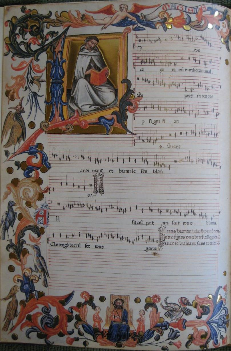 La doulse cere d'un fier animal, Codex Squarcialupi